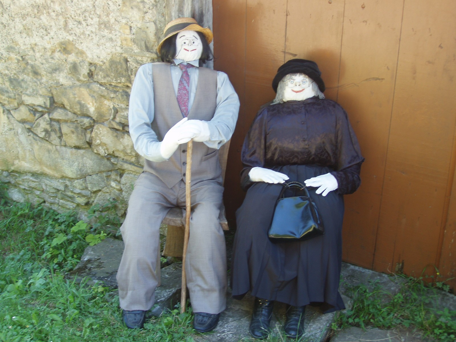 Mounaque ou Poupée de chiffon à taille humaine